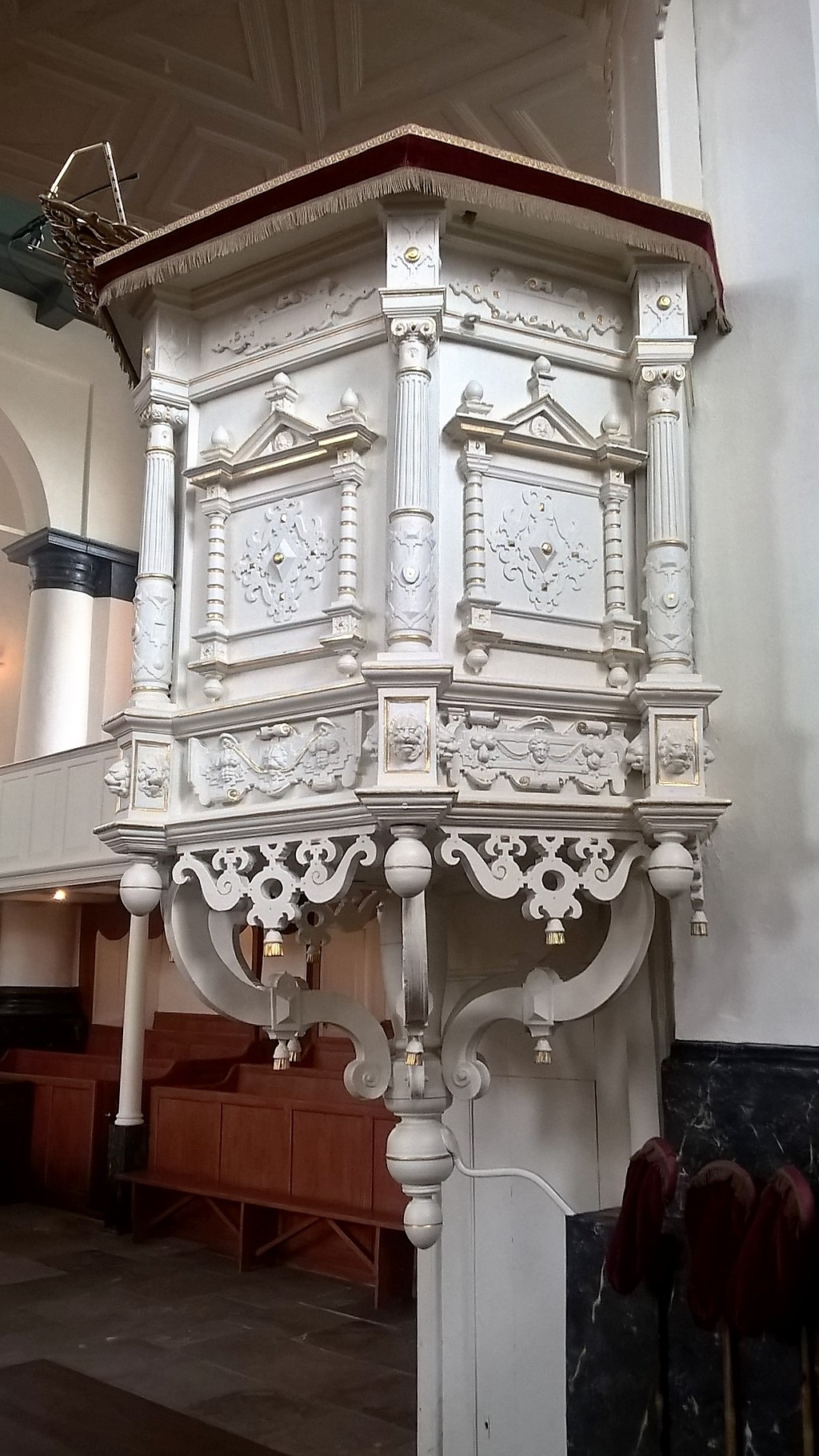 Kanzel der Großen Kirche Leer, Ostfriesland, Niedersachsen, Deutschland